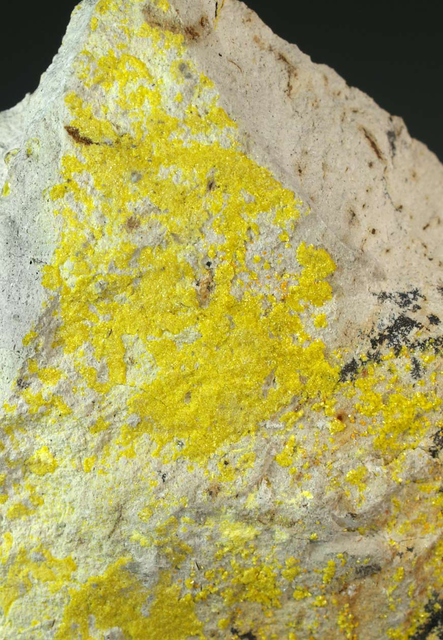 Numerosos agregados radiales de cristales tabulares aplanados de weeksita, de intenso color amarillo y transparencia. Algunos de estos agregados se hallan incluídos en glóbulos de calcedonia. Se acompañan de agregados de cristales de color naranja de carnotita. Con pirolusita dendrítica. Se trata de una mineralización de uranio-vanadio encajada en rocas sedimentarias y volcánicas de grano fino. Ejemplar analizado. Presenta actividad radioactiva. Localidad: Anderson Mine, Date Creek Basin, Yavapai Co., Arizona, Estados Unidos Medidas: 6.8 x 6.0 x 4.0 cm.